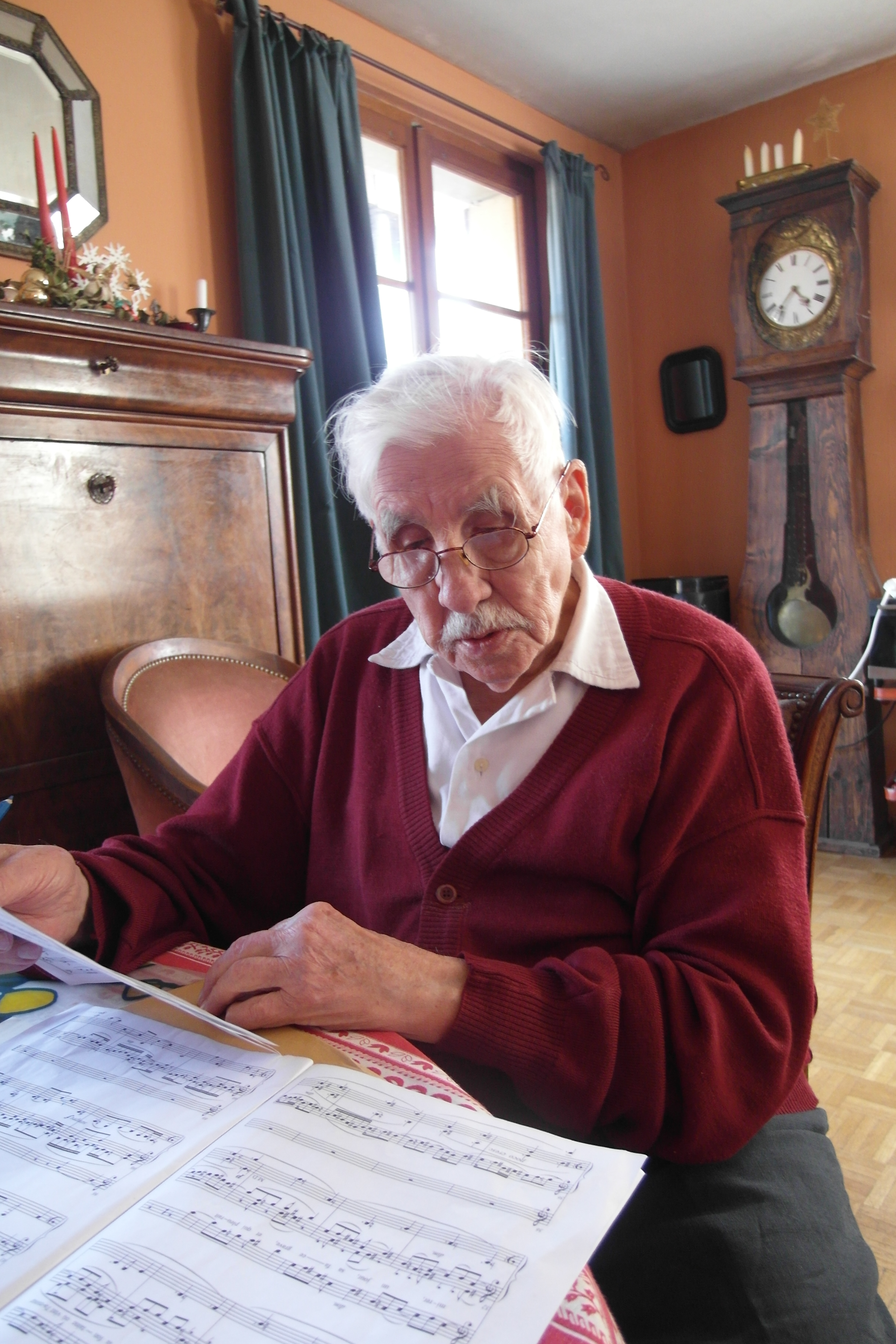 Michel Wiblé, compositeur, le jour de son 89e anniversaire